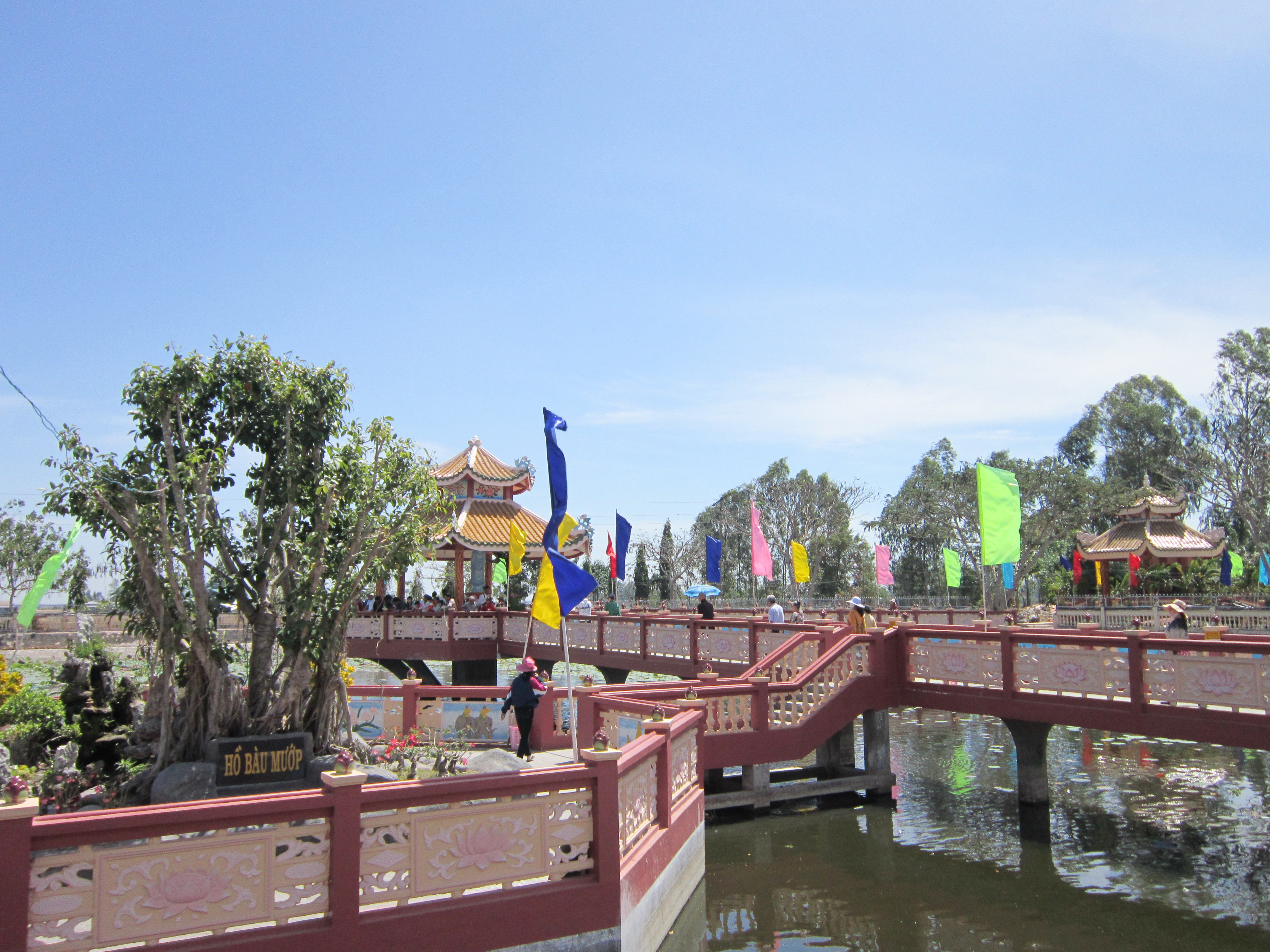 Tiểu đình tại khu miễu Bà Chúa xứ Bàu Mướp thuộc thị trấn Nhà Bàng (Tịnh Biên, An Giang, Việt Nam).